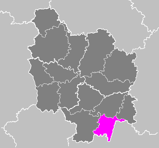 Maps of arrondissements and cantons of France: Arrondissement de Mâcon.PNG (Région Bourgogne)